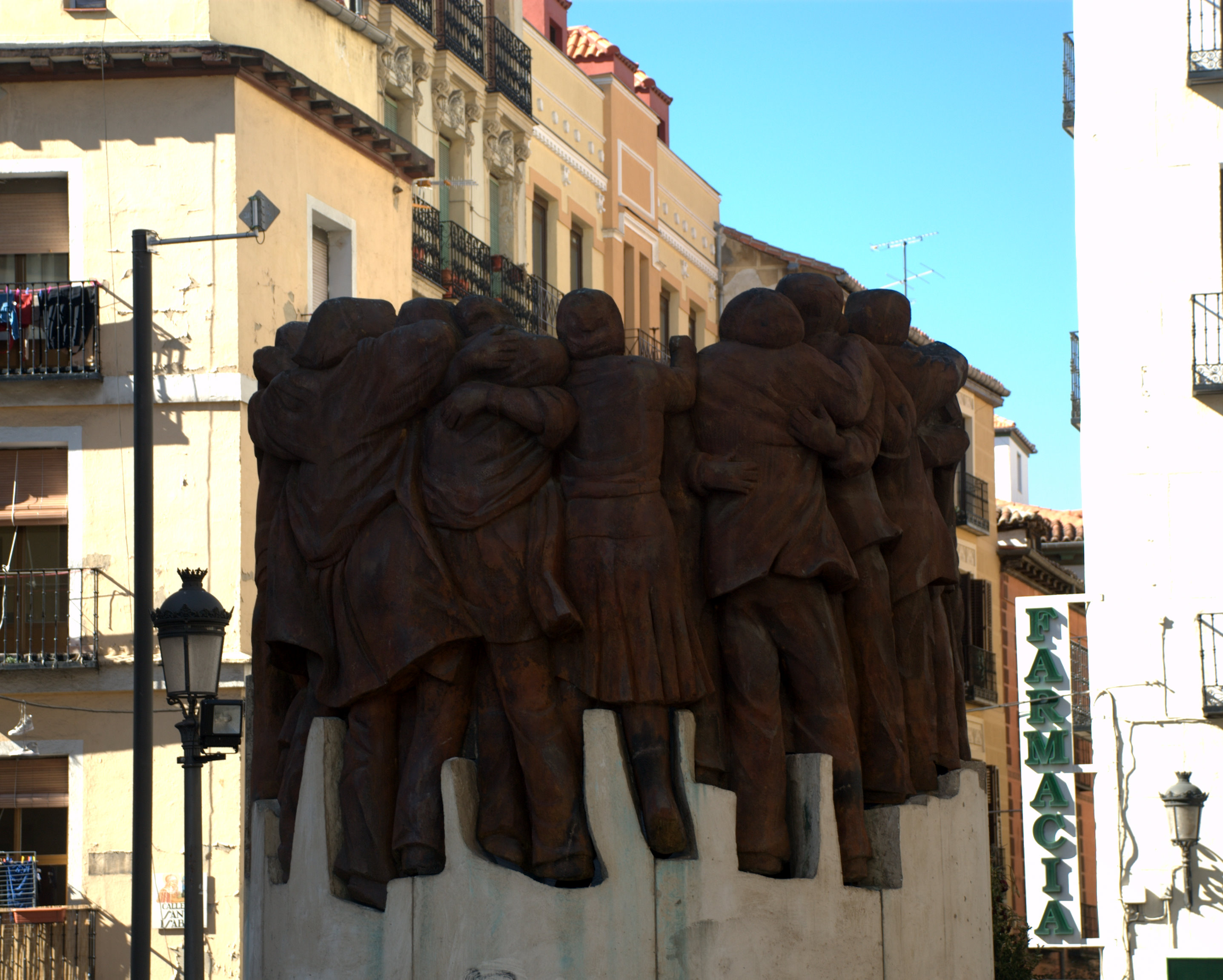 monumento aos advogados "laboralistas" homenaje a los abogados laboralistas muertos en la matanza de Atocha